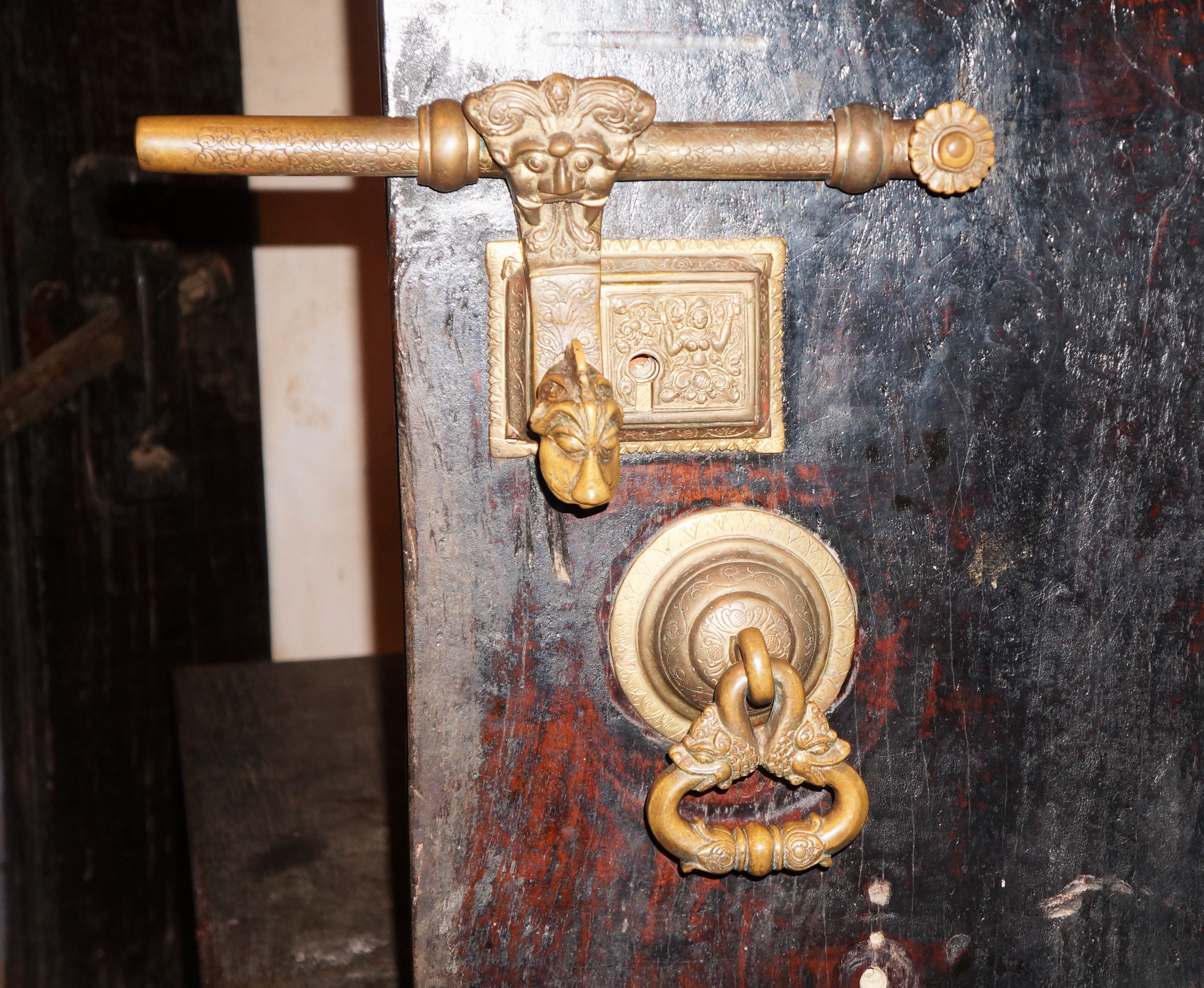 Door bolts of Embekka Devalaya Temple Kandy Sri Lanka.- Asie du Sud